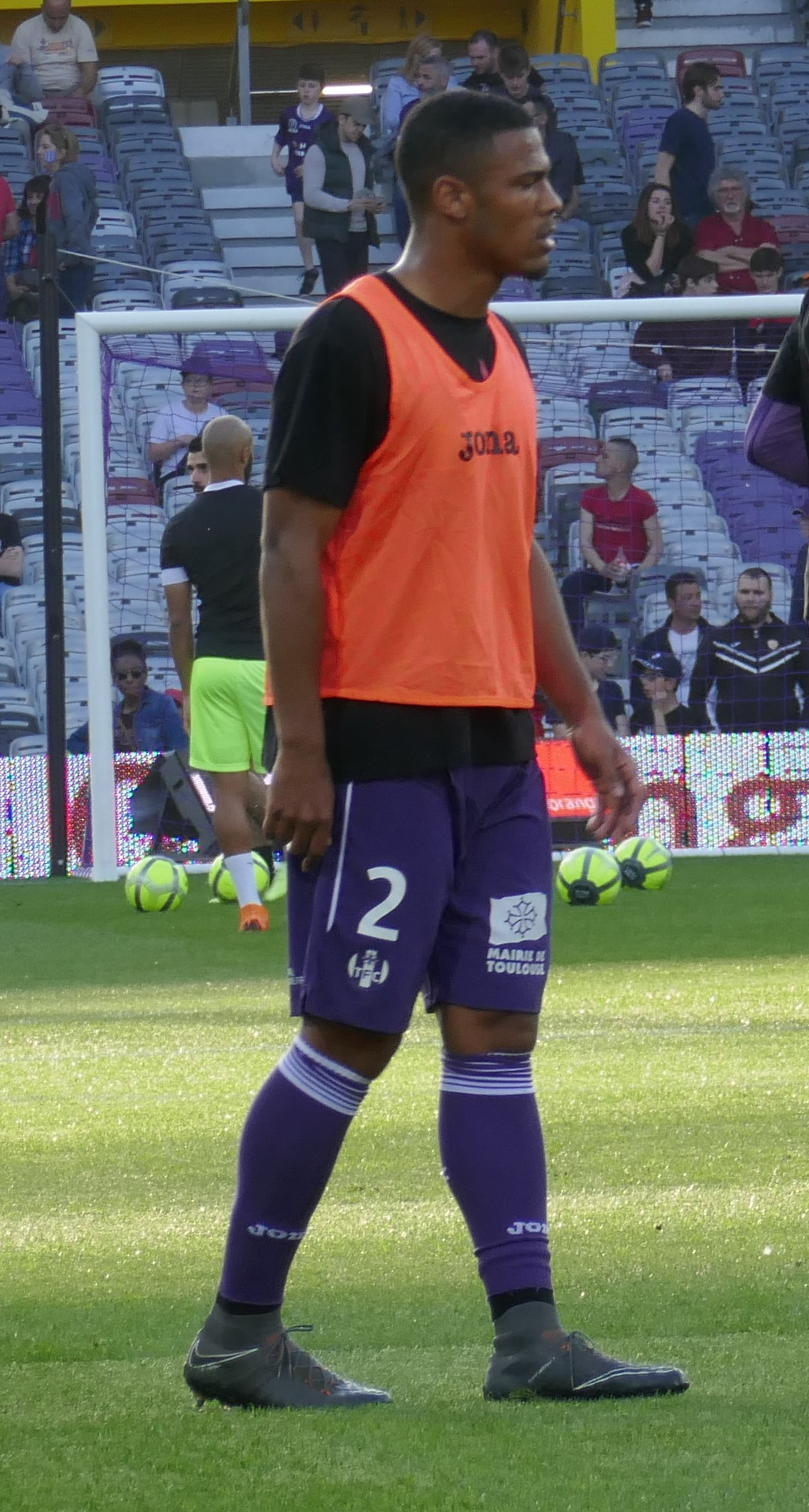 Kelvin Amian Adou lors de l'échauffement du match Toulouse FC - Angers SCO comptant pour la 34ème journée de Ligue 1 2017-2018, le 21 avril 2018.